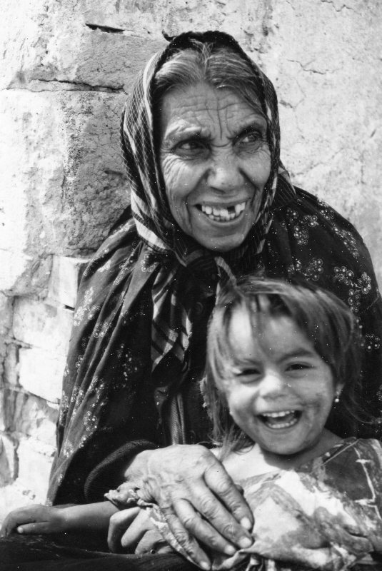 Dva úsmevy